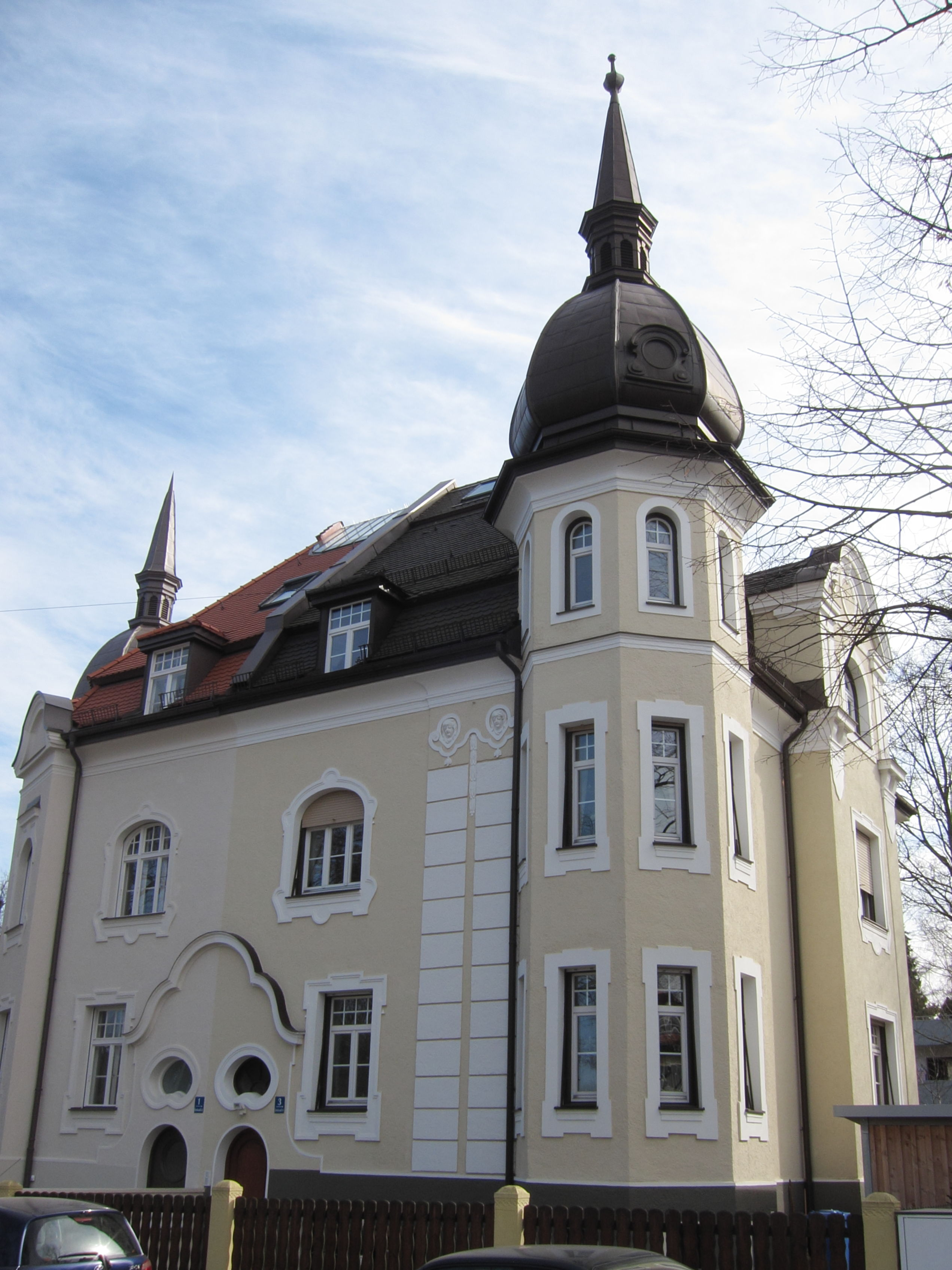 Rembrandtstraße 3; Hälfte einer Doppelvilla (mit Nr. 1), Neurenaissance, mit Türmchen, 1902–03 von Conrad Klinger.